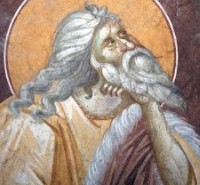 Пророк Илия